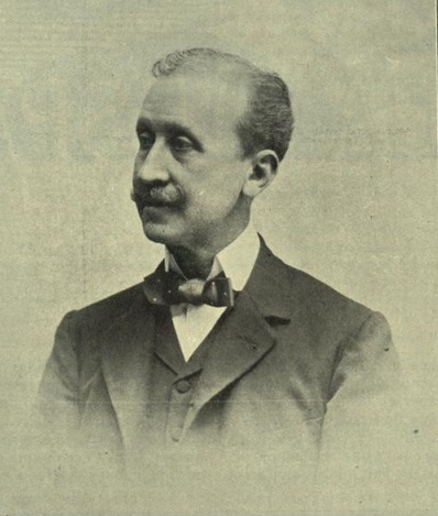 Excmo. D. Rómulo Bosch y Alsina, actual alcalde de Barcelona, de Audouard.